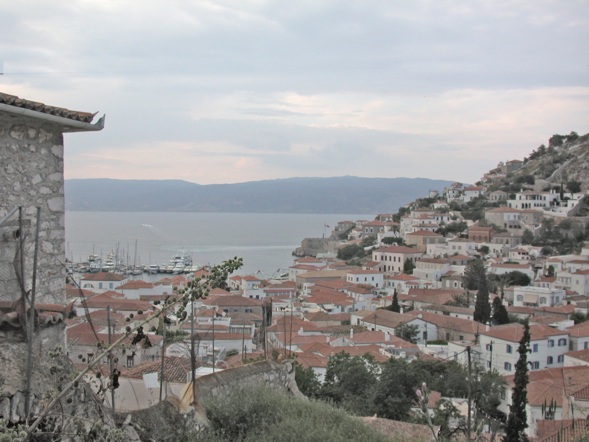 Grecia, isola di Idra, città di Idra, panorama sul porto dalla città alta